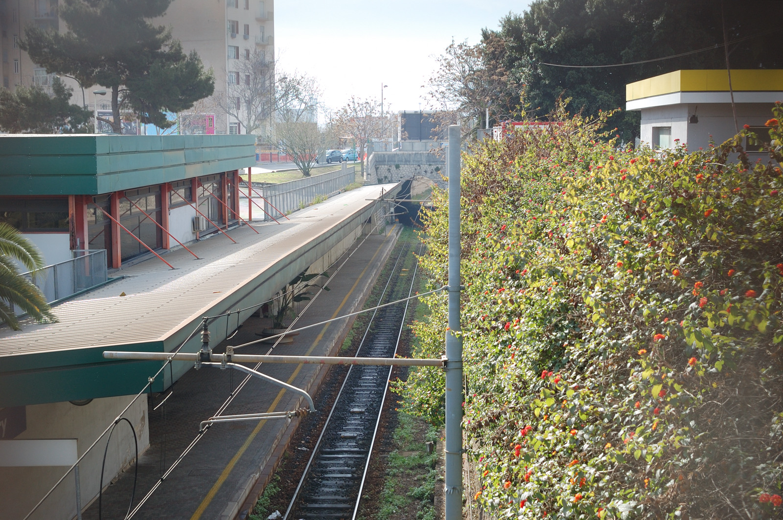 capolinea della diramazione della ferrovia metropolitana di Palermo. I treni passeggeri qui giunti invertono la marcia e ripartono verso Palermo Notarbartolo. Il binario prosegue verso il porto ed è utilizzato per inoltrare carri pianale carichi di lamiere verso il raccordo dei Cantieri Navali, dove le lamiere saranno lavorate per costruire le navi.